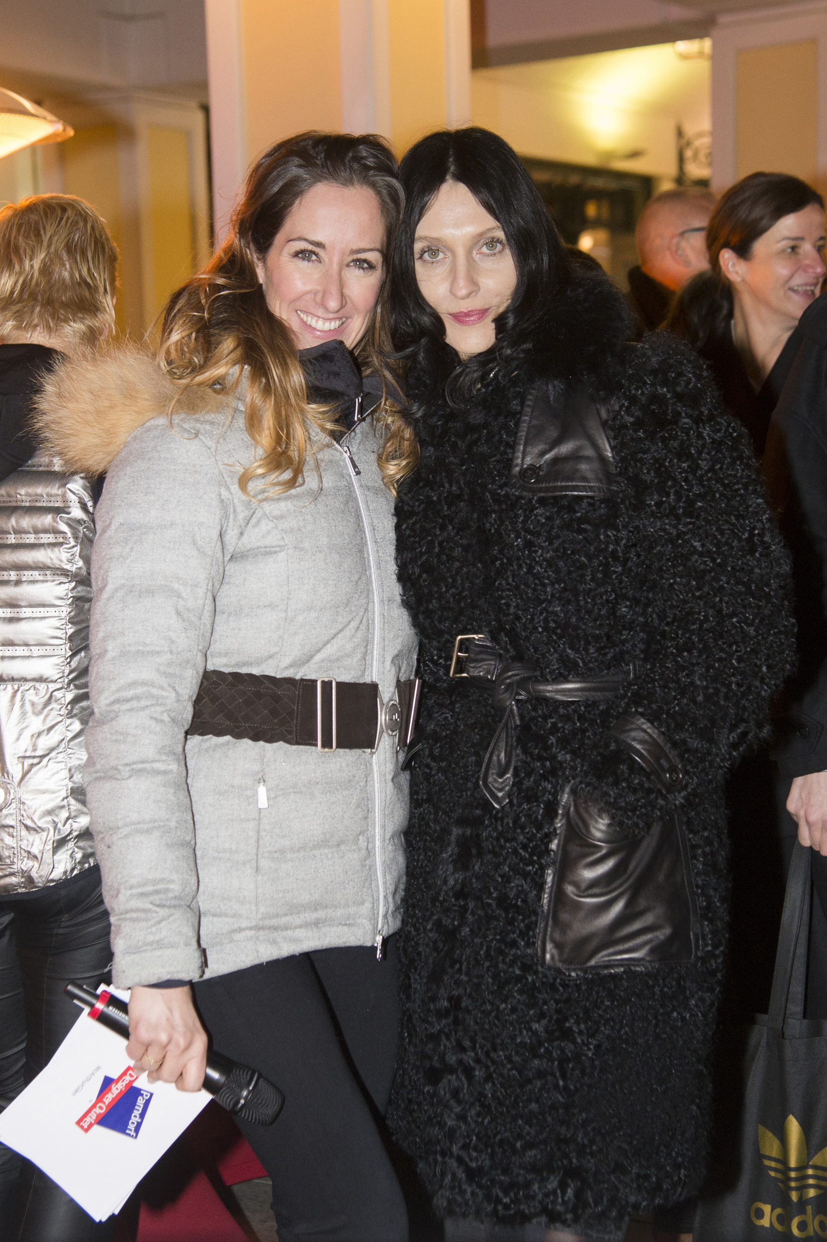 Moderatorin Kati Bellowitsch mit Stargast und Model Susie Bick beim Christmas Late Night Shopping im McArthurGlen Designer Outlet Parndorf.